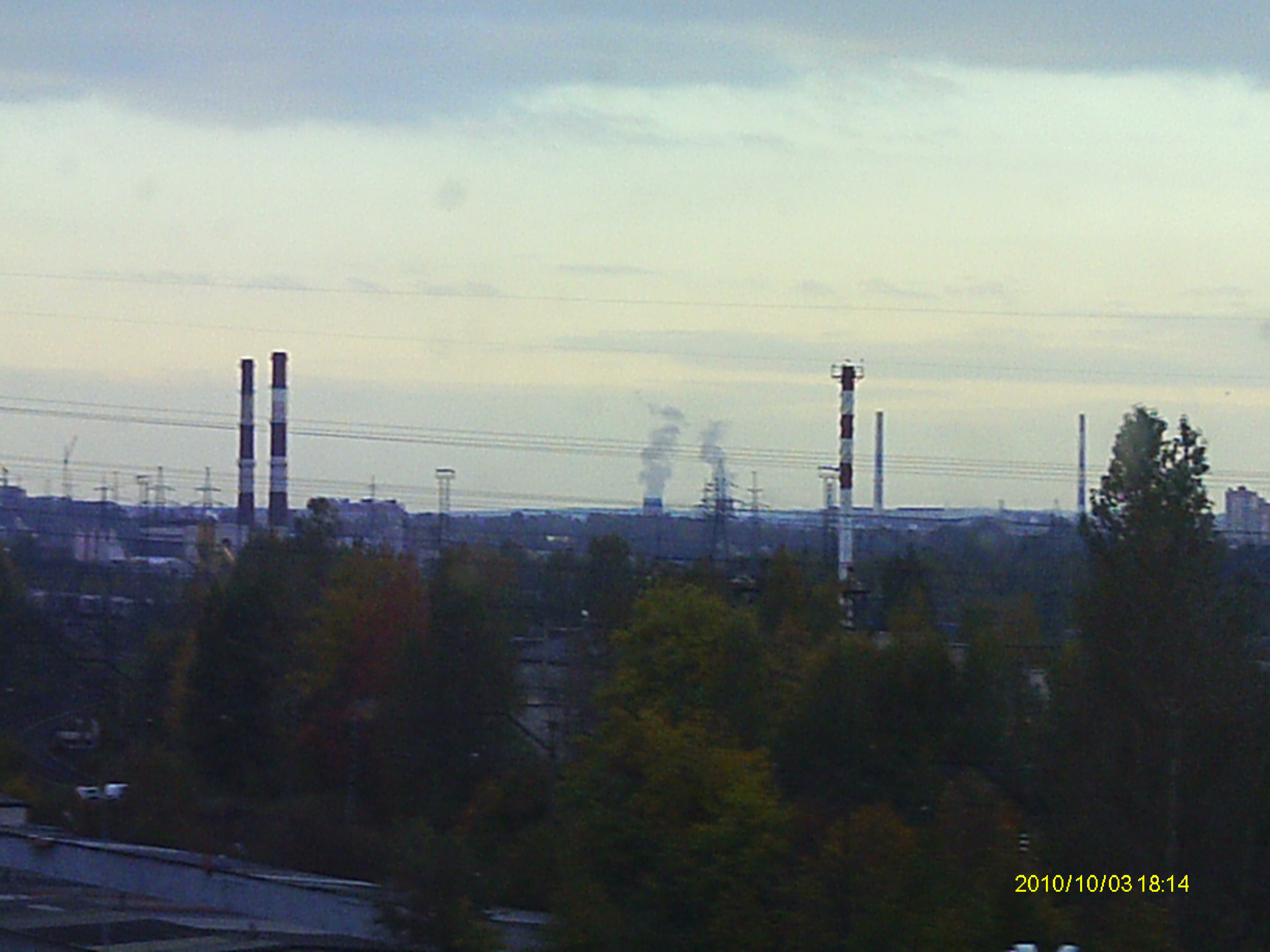 Руставели, 37